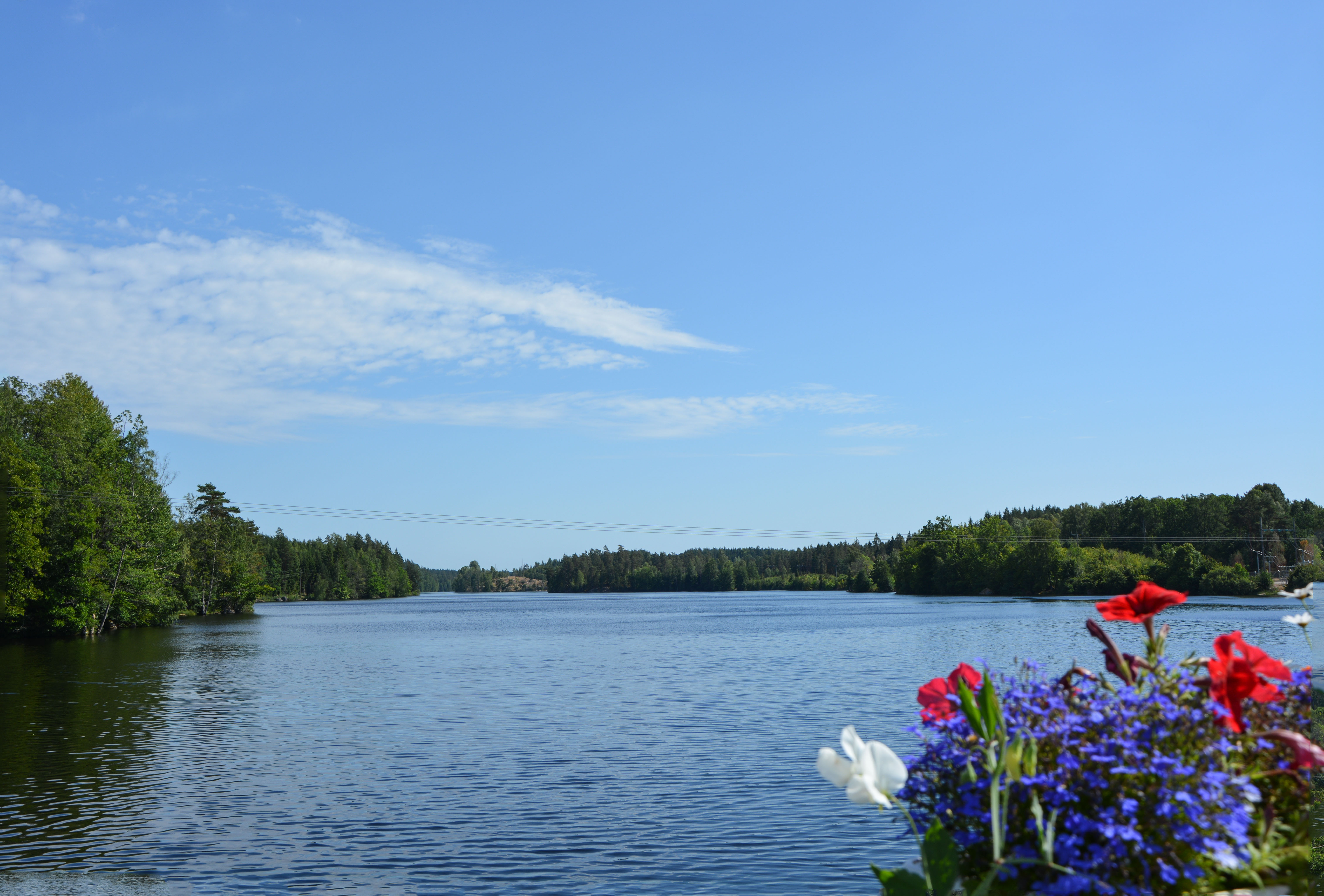 Ronnebyån vid Hjorthålan,Blekinge